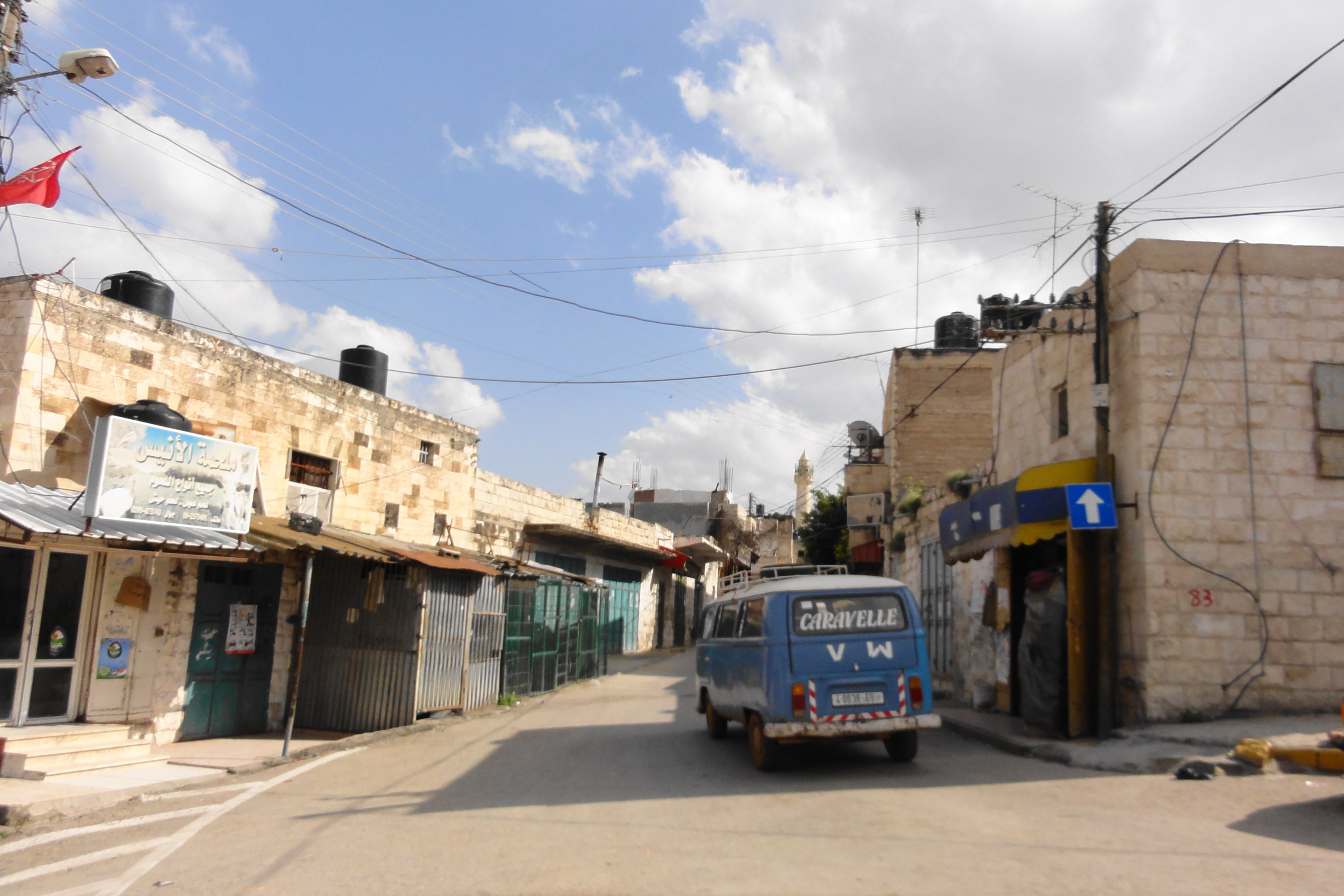 Tubas